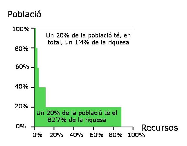 Dades mundials de 1992, segons l'informe anual de la United Nations Development Programm, UNDP (programa de desenvolupament de les Nacions Unides). Una cinquena part de la població mundial viu amb més de quatre cinquenes parts dels recursos mundials. Si la resta del món visqués com aquesta cinquena part més rica, necessitaríem 15 Terres més per a que hi hagi recursos per tothom.